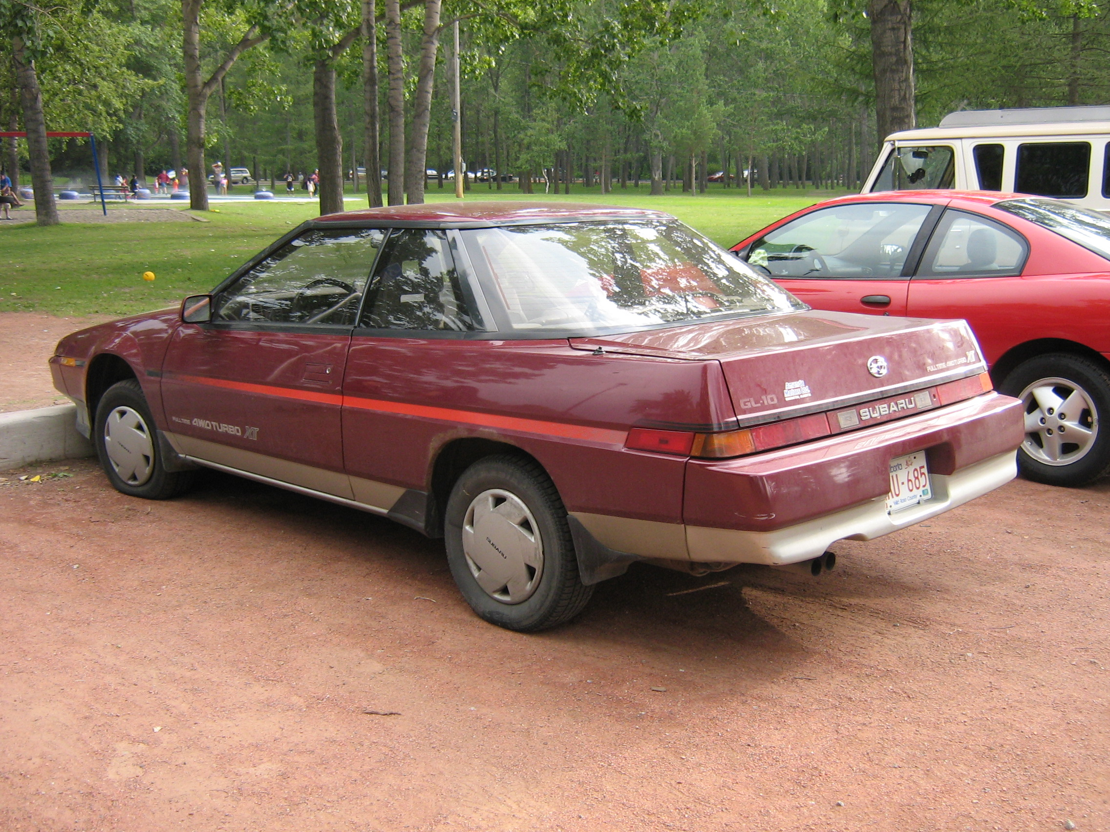 Subaru GL-10 XT Turbo